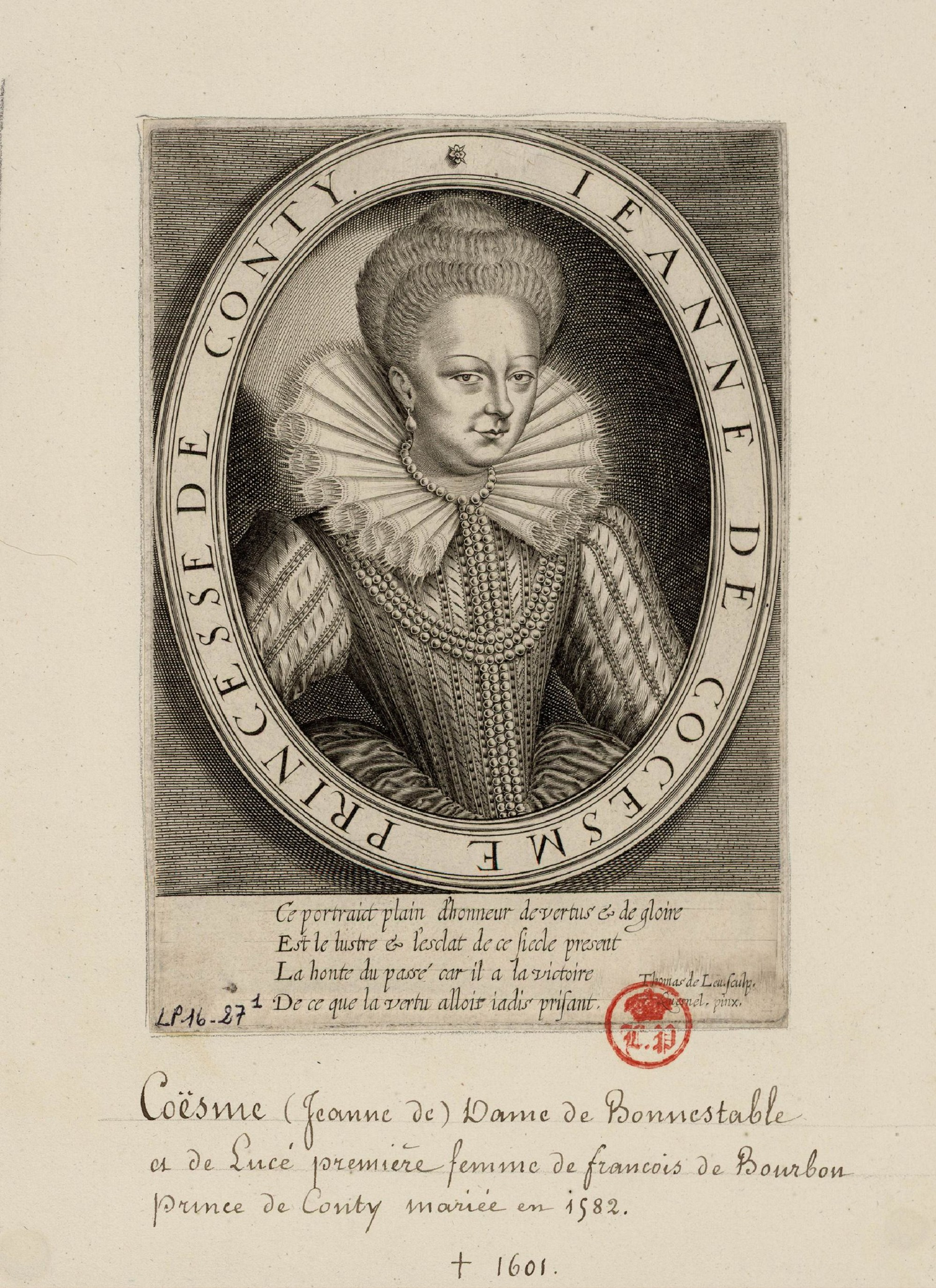 Jeanne de Coesme, Dame de Lucé et de Bonnétable, Princesse de Conti